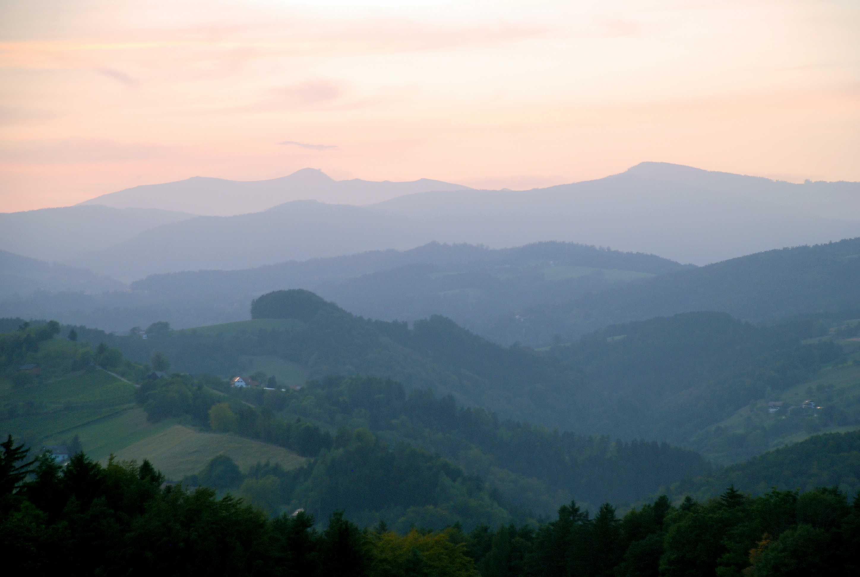 Turmburg Sterglegg bei Eibiswald, Steiermark, Gemeinde Großradl:Blick nach Westen Richtung Koralpenzug